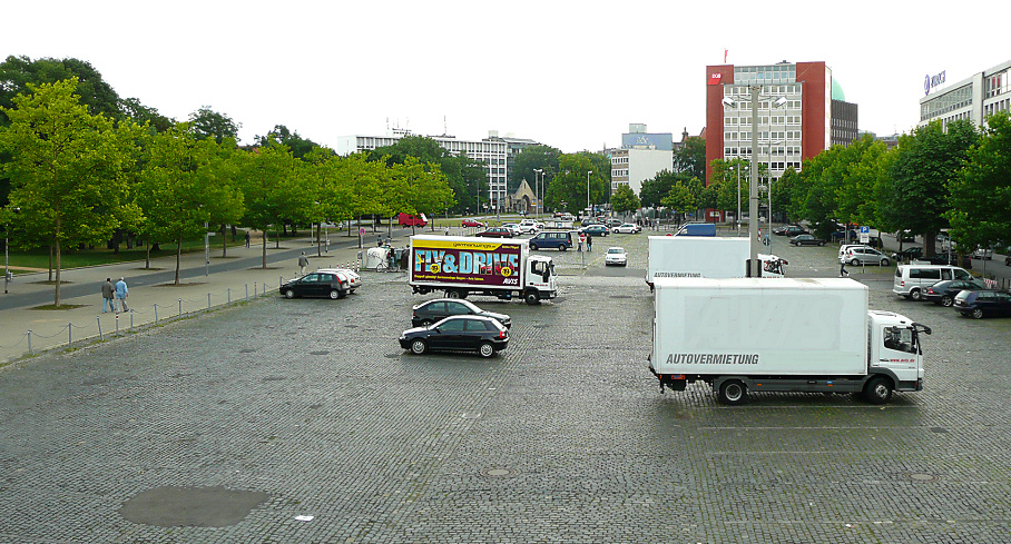 Klagemarkt Hannover